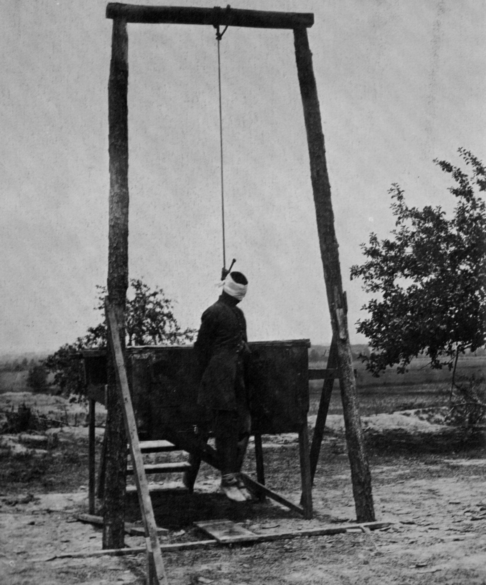 O'Sullivan, Timothy H.: Petersburg, Virginia, eine Exekution für versuchte Vergewaltigung